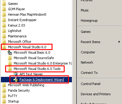 Setup Installer (Package & Deployment) sebagai Tools yang terpisah dari IDE Environment Visual Basic 6.0